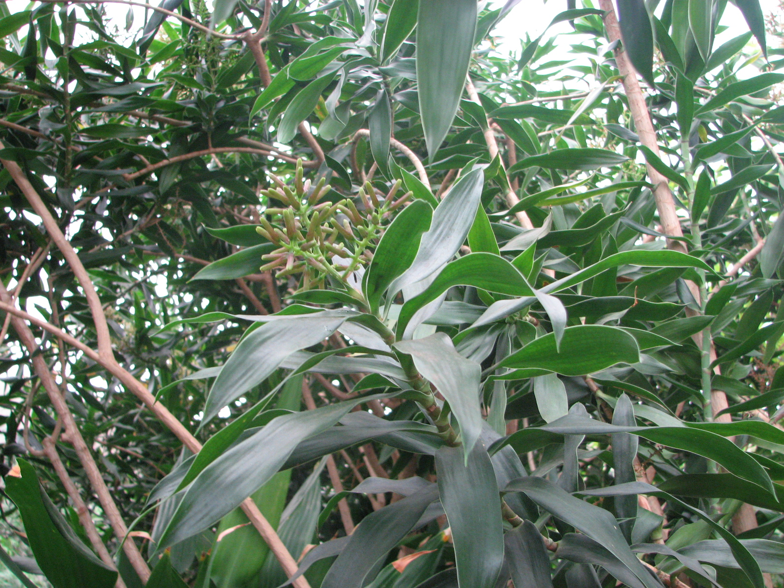 Reflex Dracaena, Dracaena reflexa, at NC Zoo